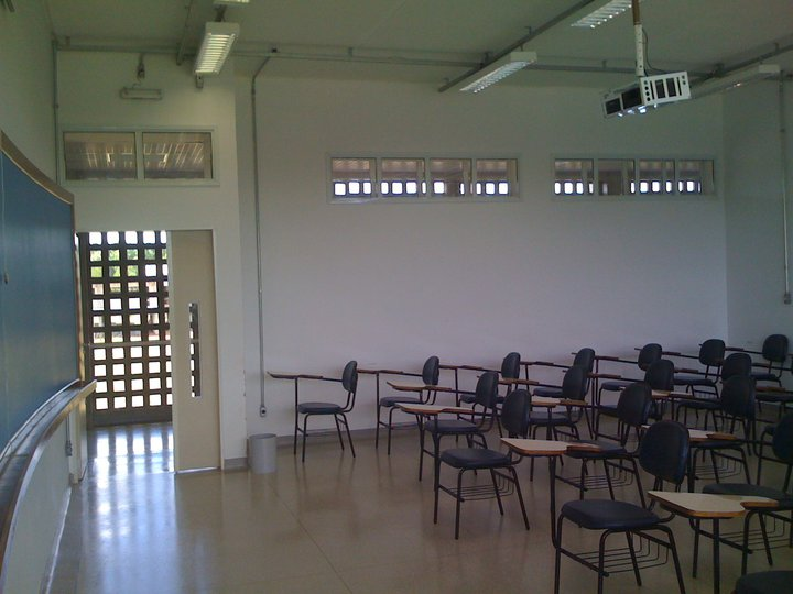 Sala de Aula da UFSCar